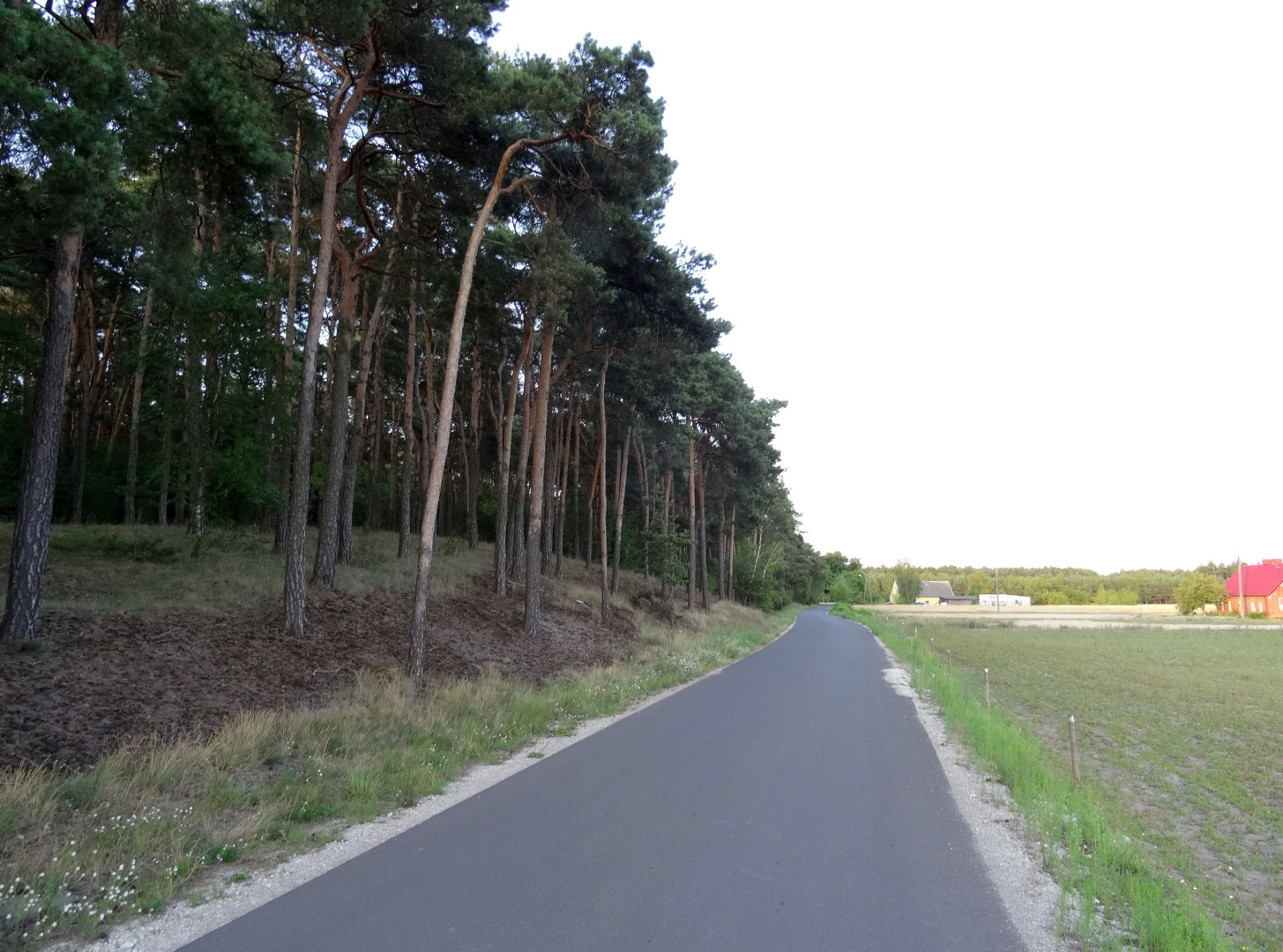 Jakubowo, gmina Nowa Wieś Wielka, powiat bydgoski